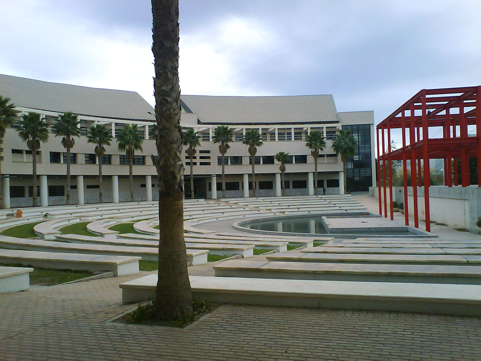 Anfiteatro del Aulario II de la Universidad de Alicante (España)